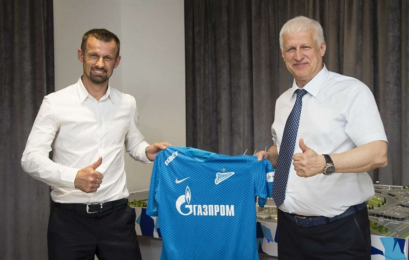 29.05.2018. Россия, Санкт-Петербург. Встреча в Клубе Председателя правления ФК «Зенит» Сергея Александровича Фурсенко и главного тренера «Зенита» Сергея Семака.